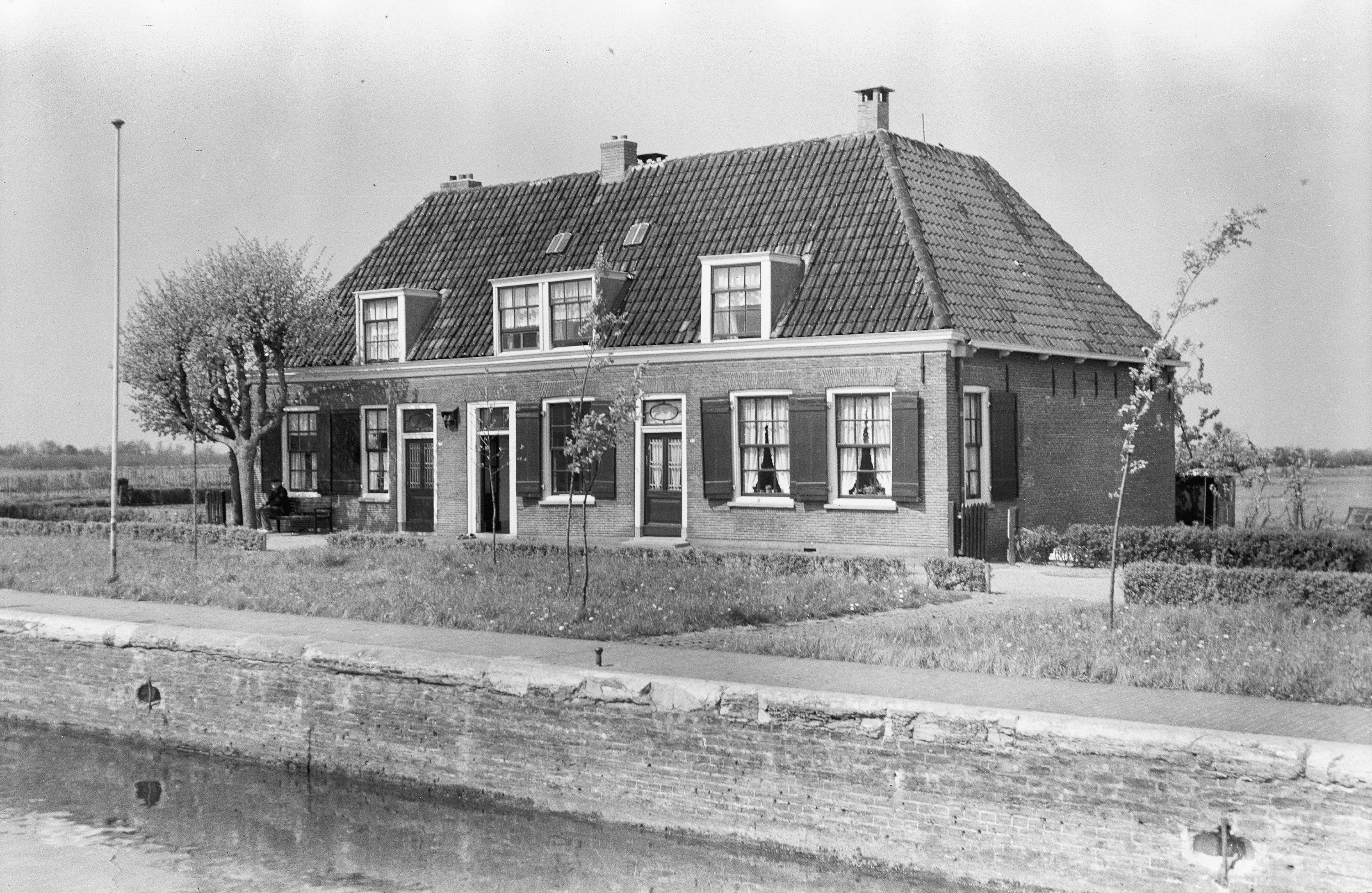 Tolhuis: Huis ten Drecht, voorgevel tolhuissluis